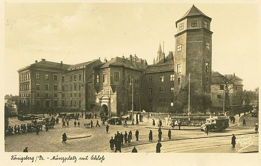 Königsberger Schloß vom Münzplatz